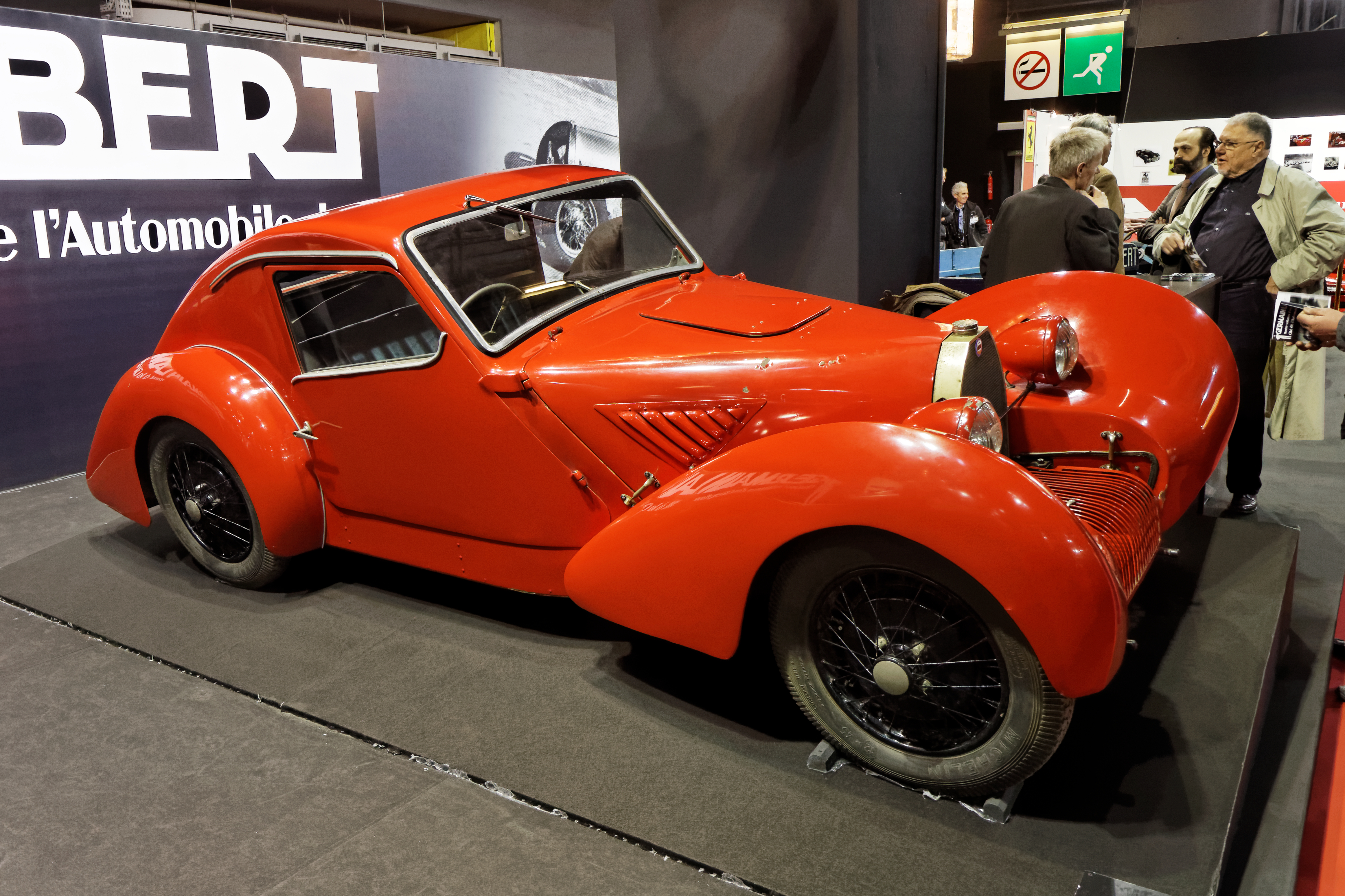 Une Lambert Coupé présentée lors du salon Retromobile 2013.